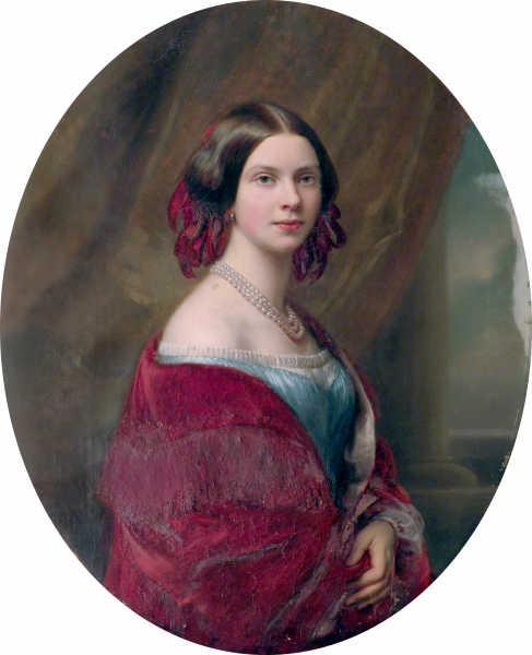 Prinses Bildnis der Erbprinzessin Charlotte als Braut